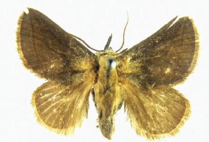 Monema flavescens